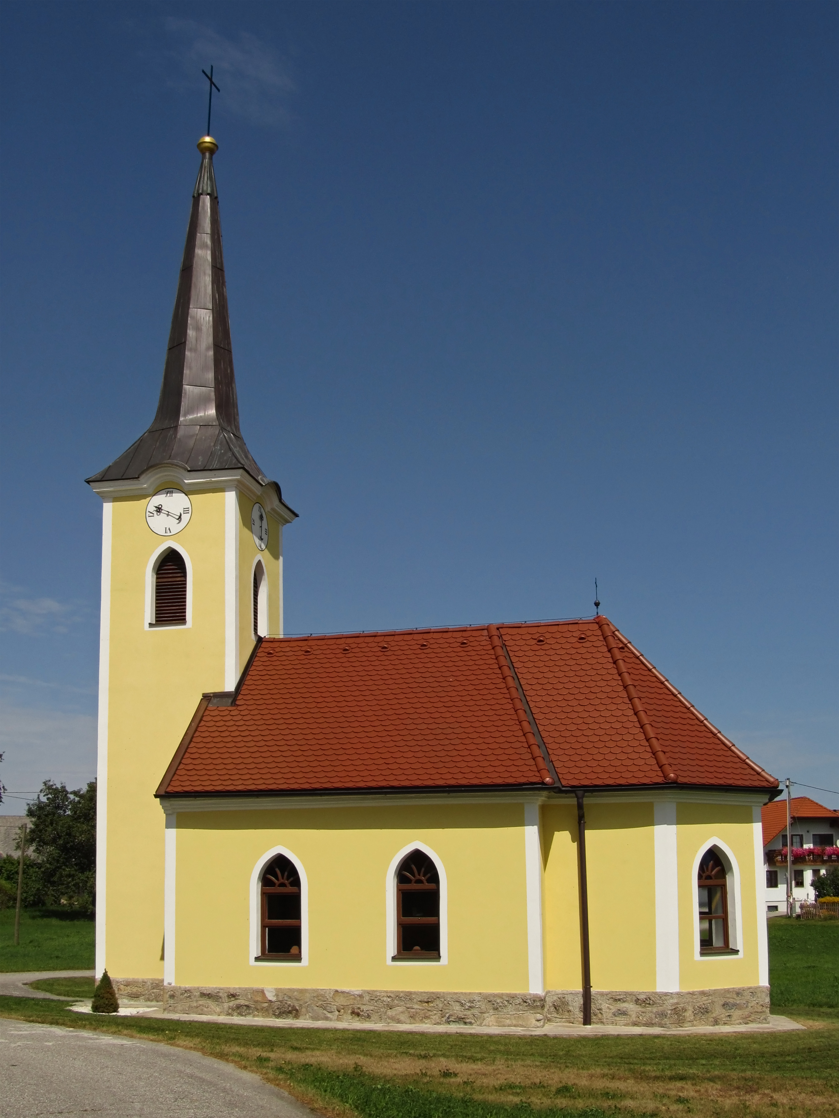 Kaiser-Franz-Joseph-Jubiläumskapelle. Schlichte Kapelle, dreiseitiger Schluss, vorgestellter Turm mit Giebelspitzhelm. Bezeichnet 1909.